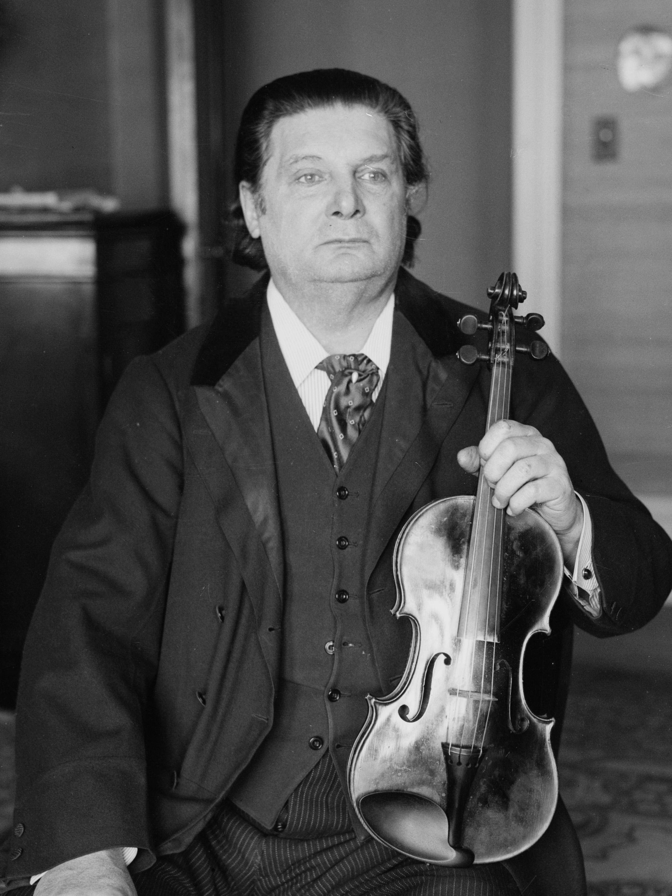 Belgian violinist and composer Eugène Ysaÿe (1858-1931)